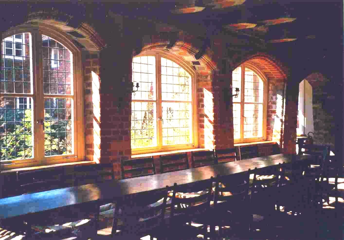 Sommer-Remter im Kloster Lüne, im Stil des 16. Jahrhunderts restauriert.